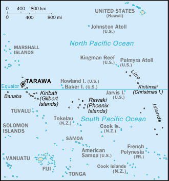 Mapka Kiribati z CIA Factbook